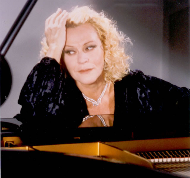 Lucia Valentini-Terrani dans les années 80.